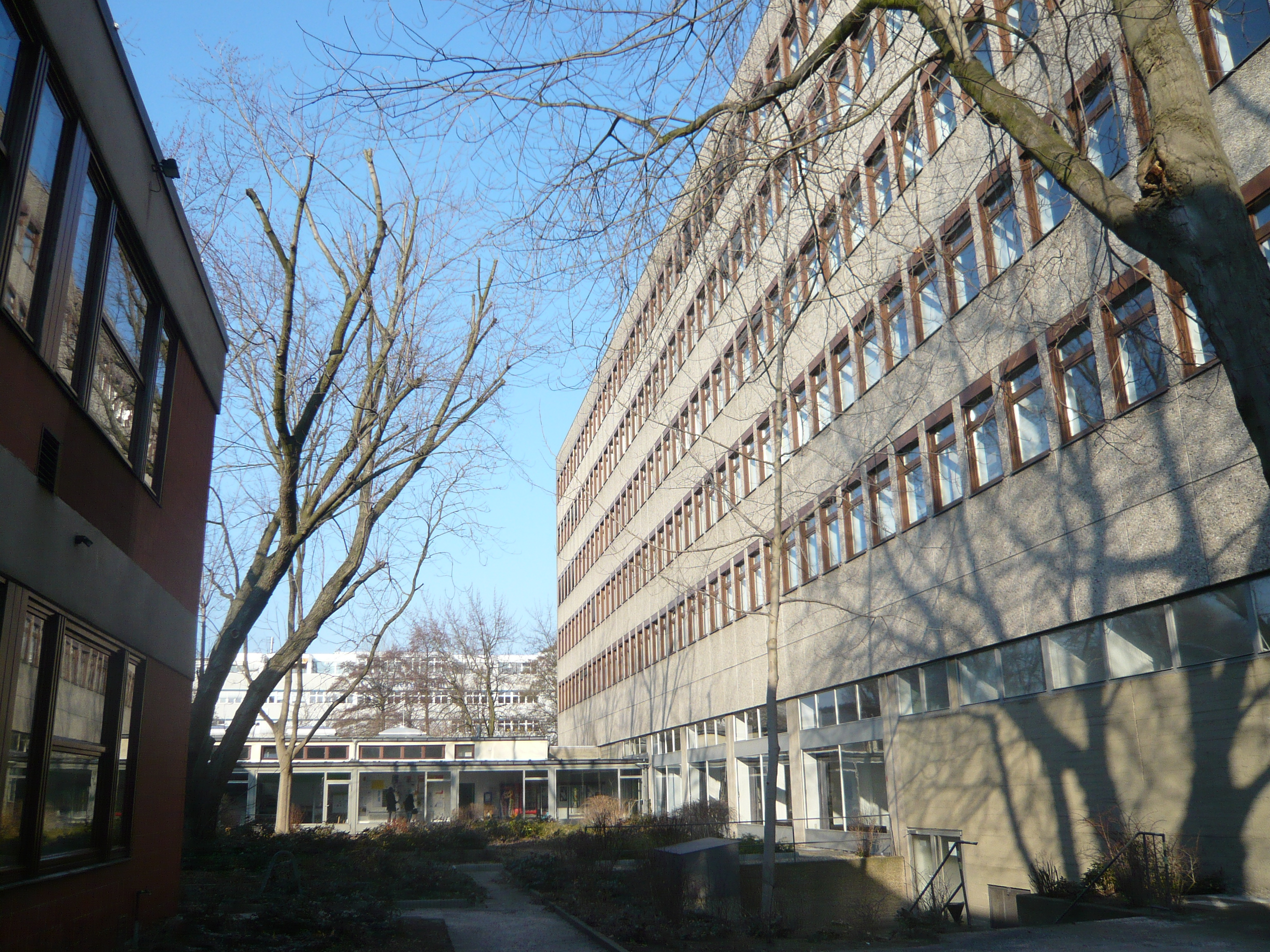 Universität der Künste Berlin, Standort Einsteinufer